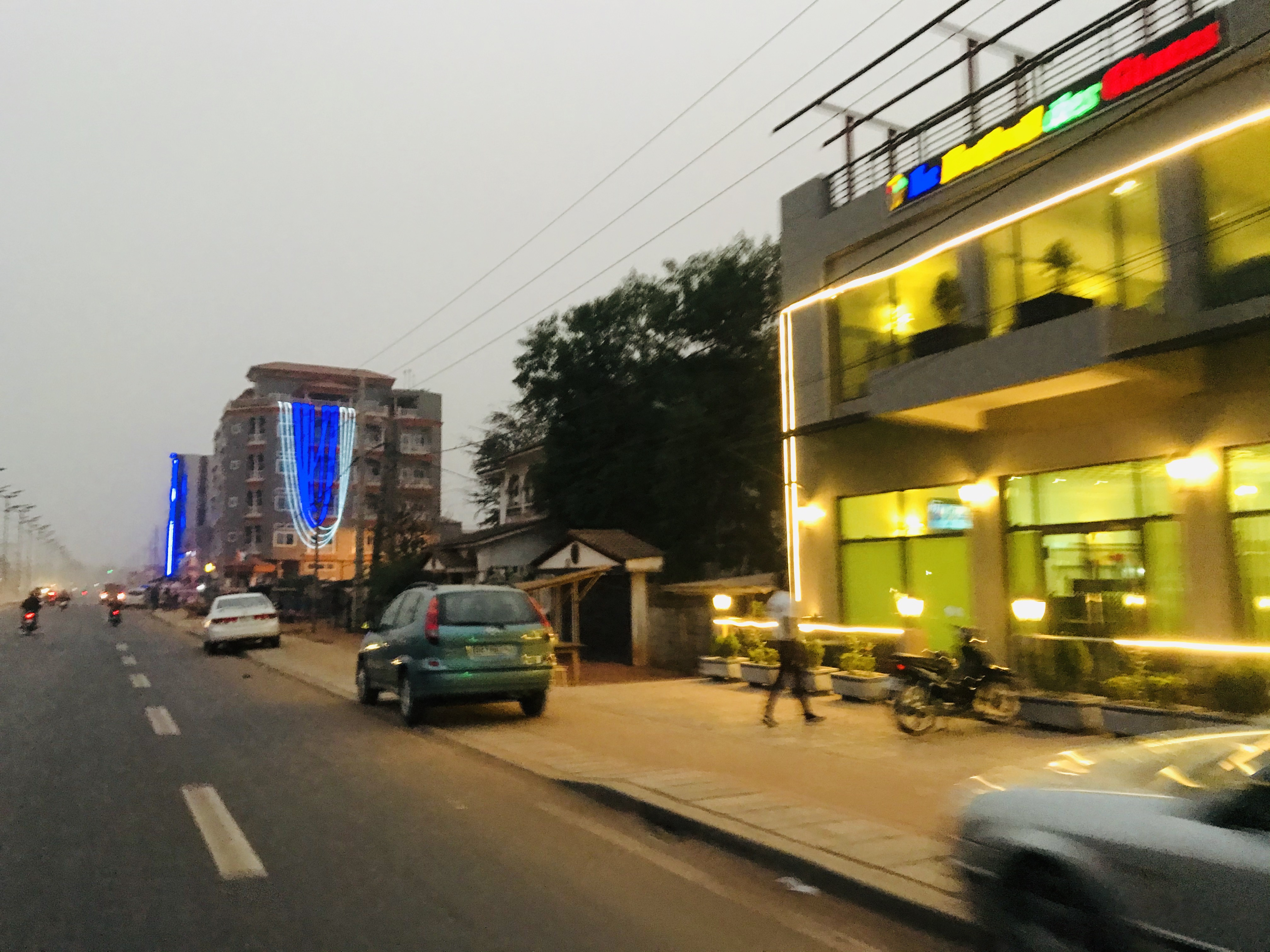 Axe principal à Porto-Novo This is an image with the theme "Africa on the Move or Transport" from: Benin